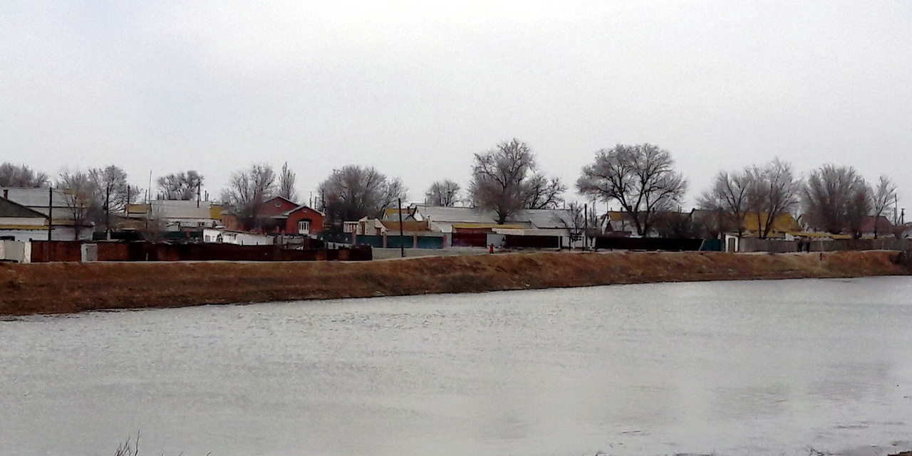 Қазақша (кирил): с.Хиуаз